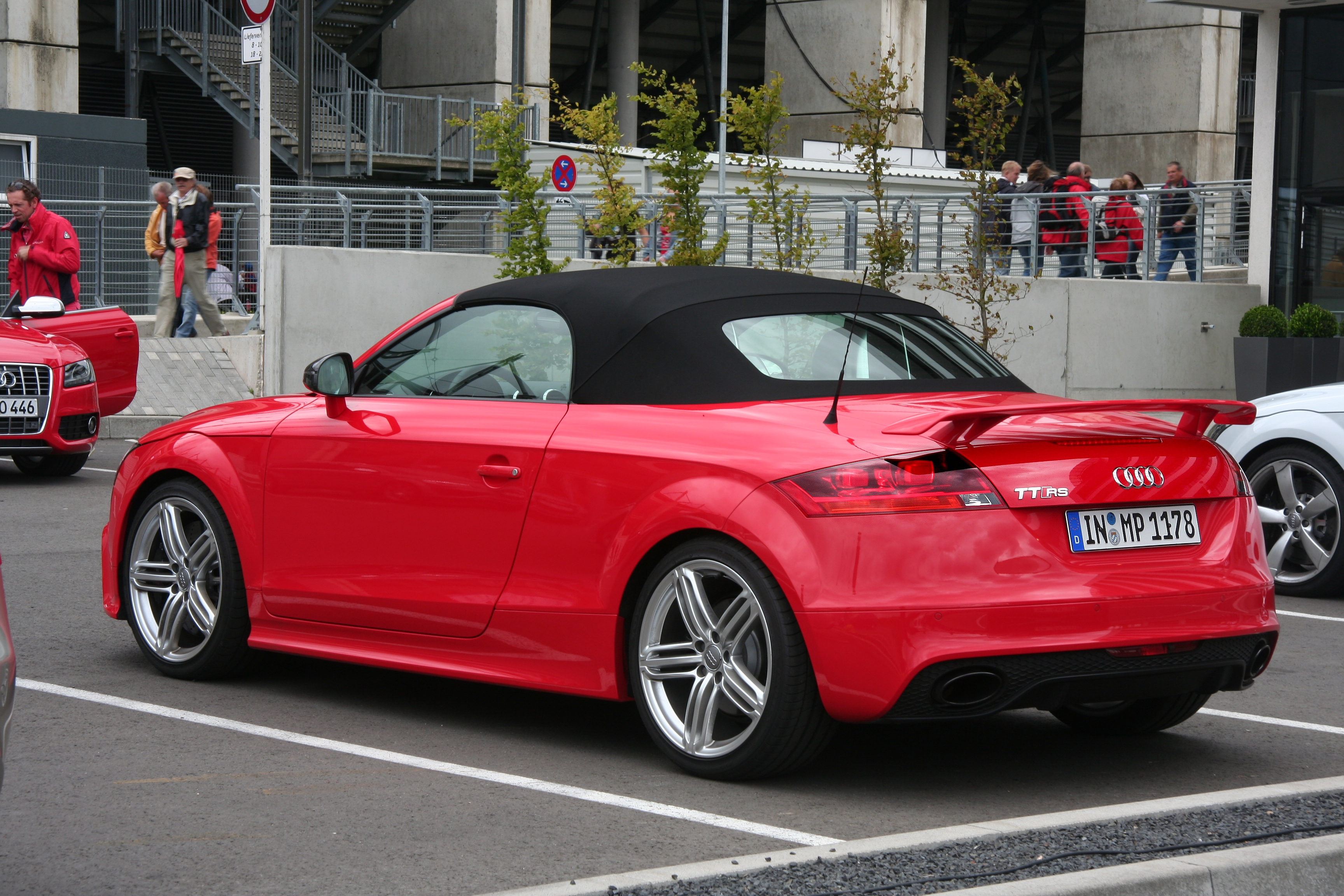 Audi TT RS Roadster, Baujahr 2011, am Nürburgring